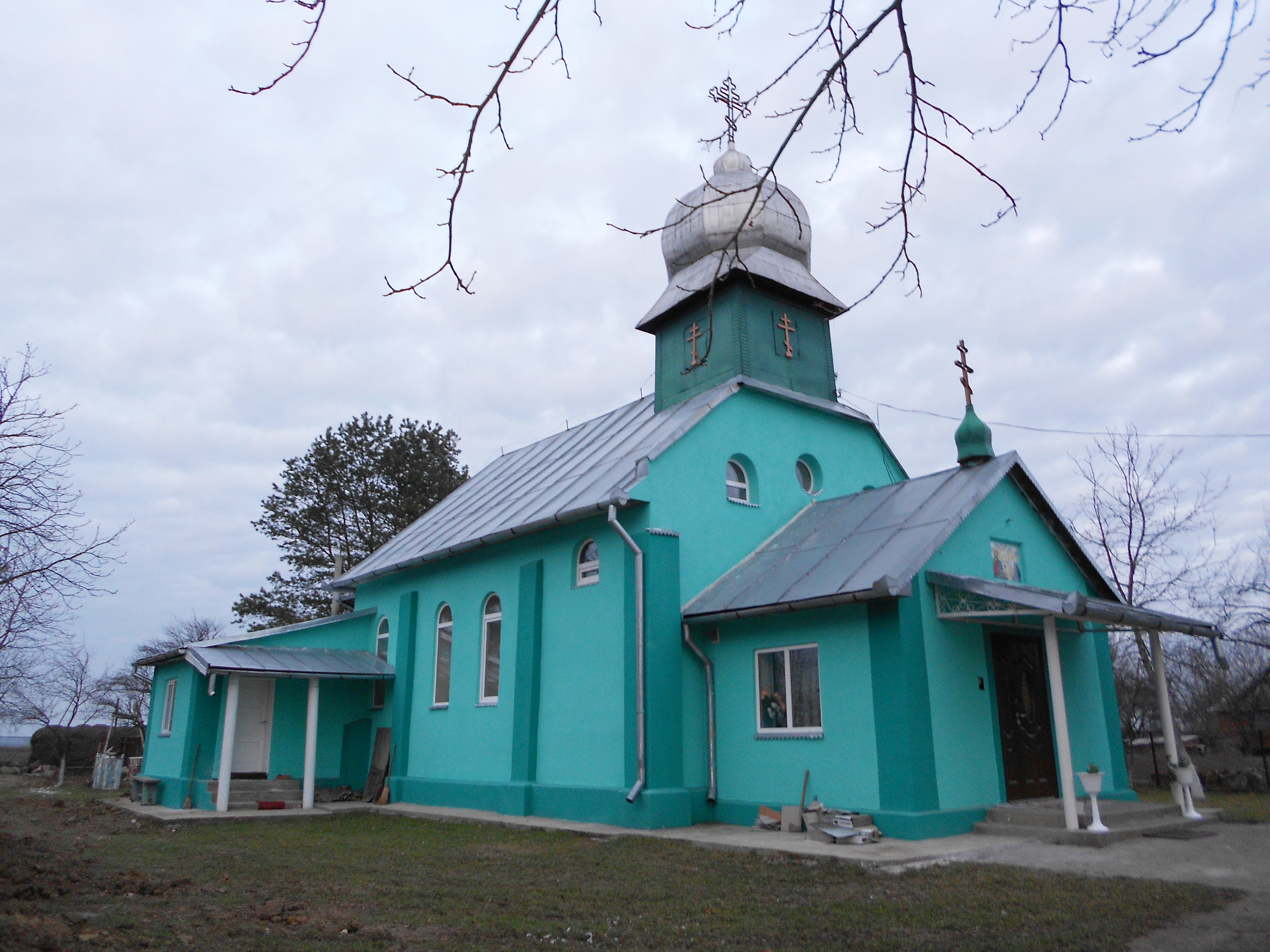 Православна церква в с. Данилівка